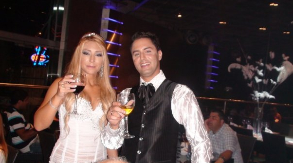 רינת בר בחתונתה עם אורון אפריאט